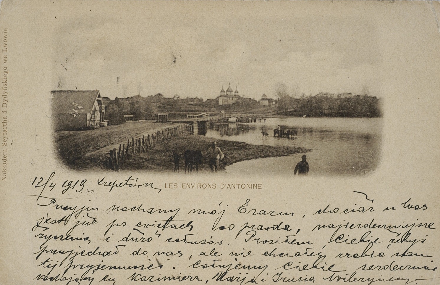 Антоніни на Волині.